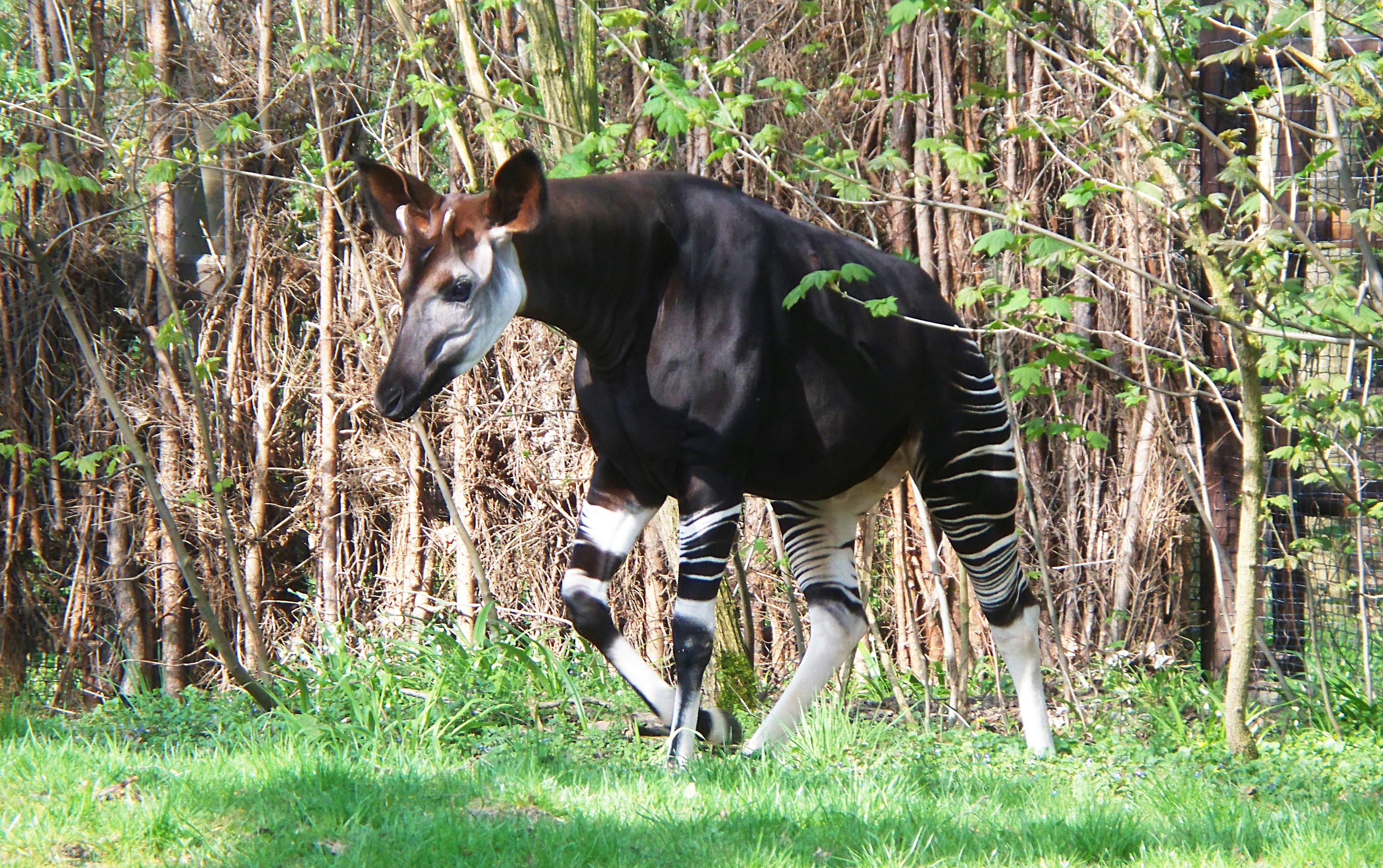 Okapi im Okapi-Wald des Zoo leipzig